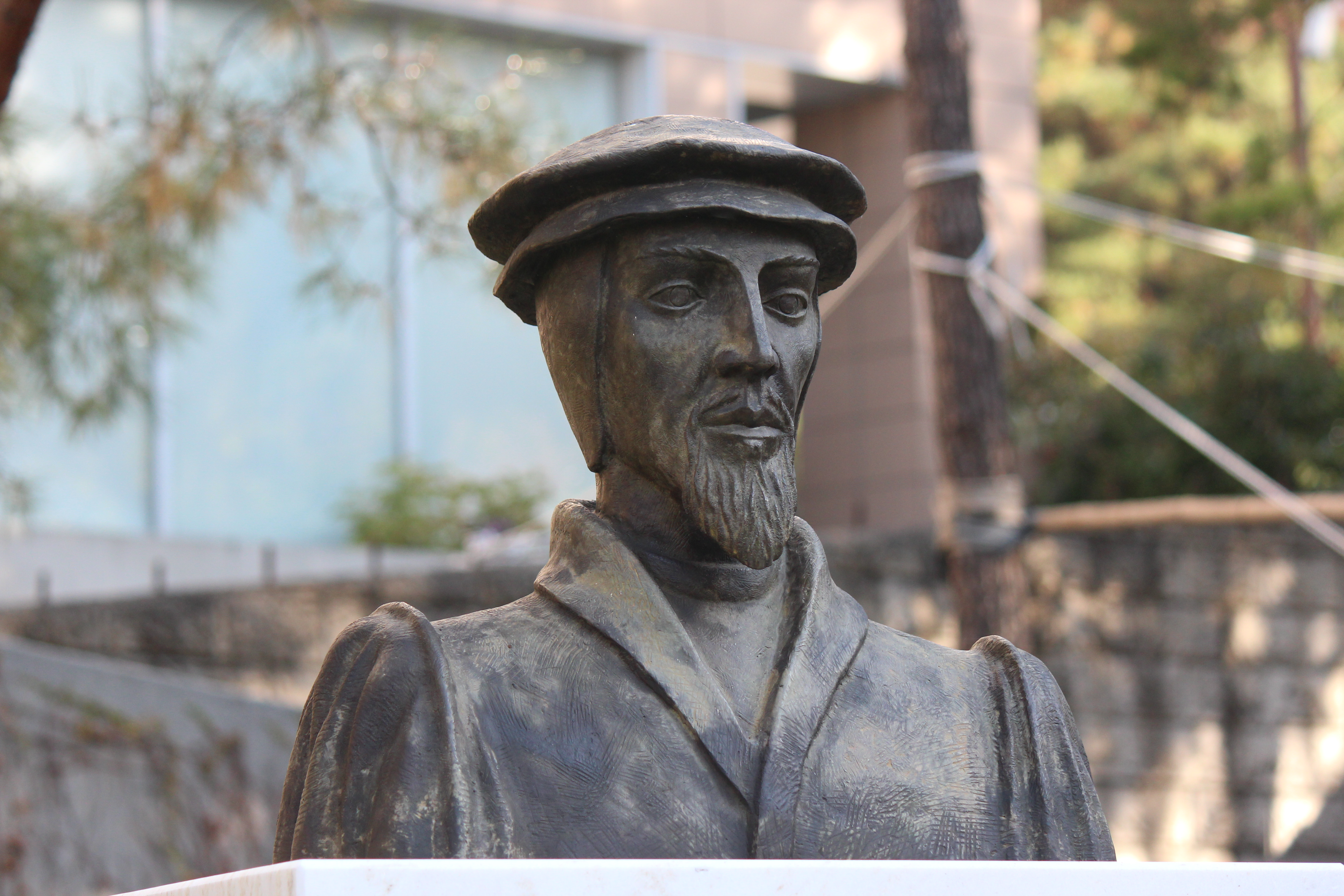 프랑스의 유명한 조각가 다니엘 레클레로(Daniel Lecleroq)가 만든 장 칼뱅 동상, 장신대학교 1. 건립장소: 장로회신학대학교 마포삼열기념동상 옆 2. 조각가:프랑스 Daniel Leclercq 교수 3. 작품크기: 60cmx60cmx30cm 좌대크기: 170cm(세로)x80cm(가로)x50cm(폭) 4. 재료: 청동 5. 제작기간: 2008년 10월부터 2009년 4월까지 6. 후원: 요한칼빈탄생500주년기념사업회